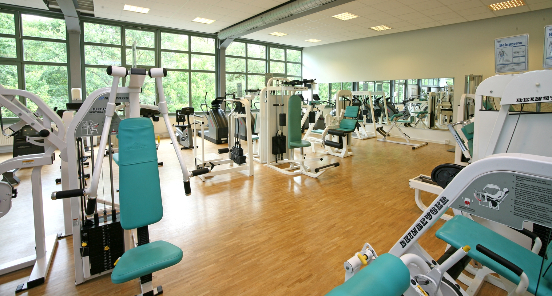 Blick in den Fitnessbereich